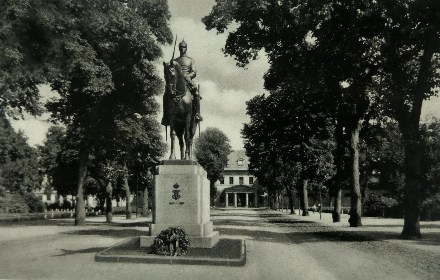 Dragoner-Denkmal Alexandrinenplatz in Ludwigslust.